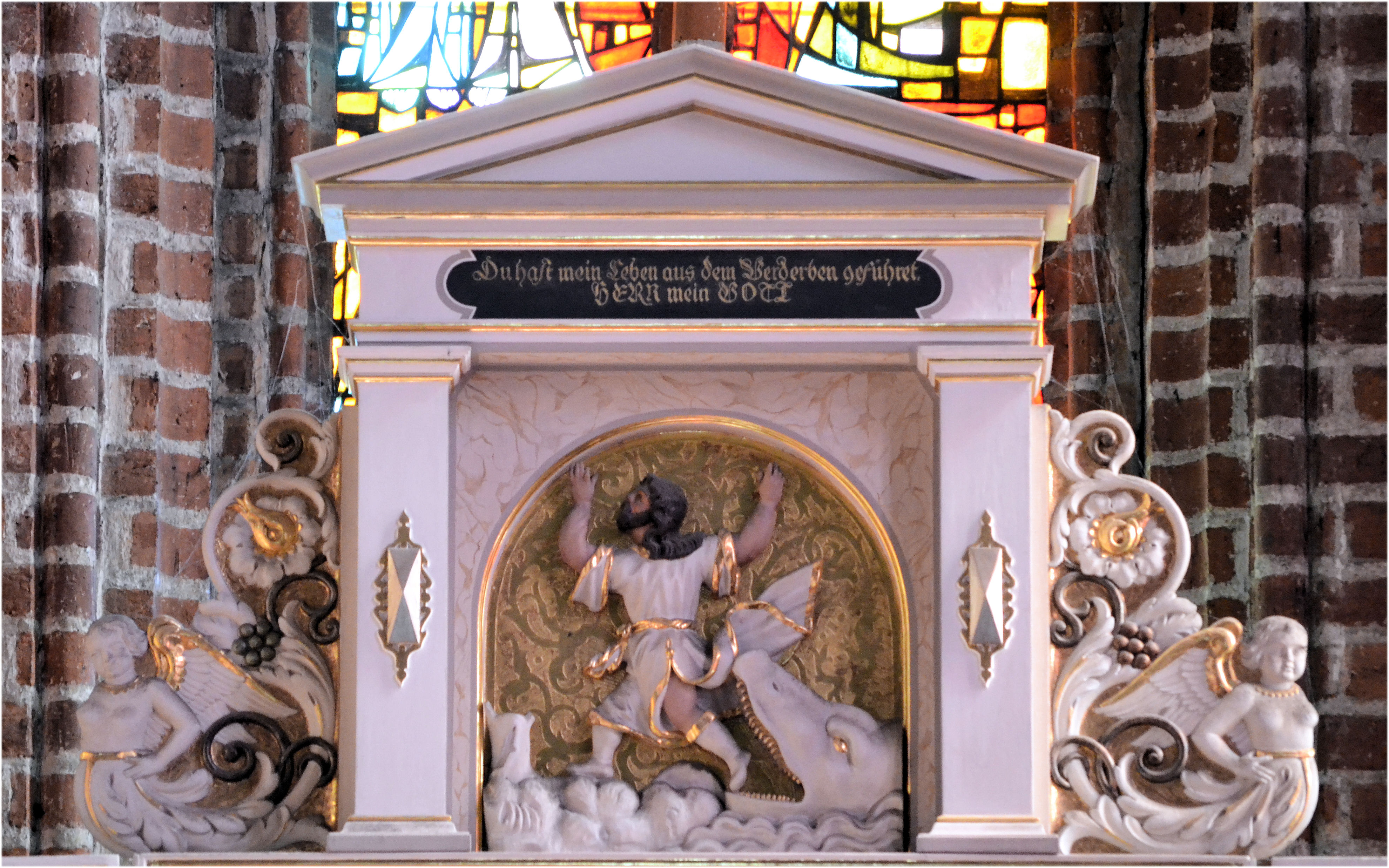 Płaskorzeźba przedstawiająca proroka Jonasza w zwieńczeniu ołtarza głównego katedry w Gorzowie Wielkopolskim.